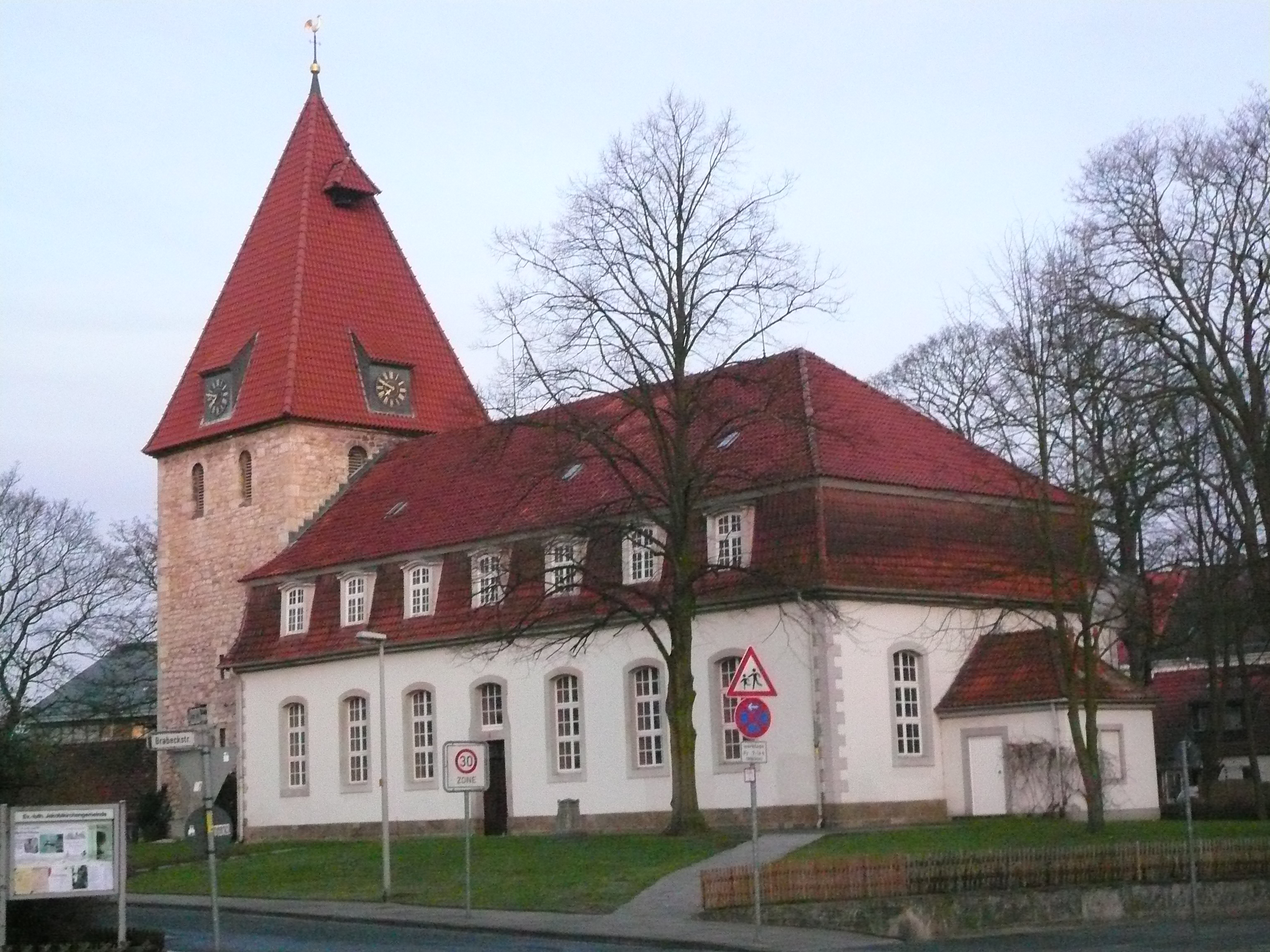 Ev.-luth. Kirche St. Jakobi in Hannover-Kirchrode in der Morgendämmerung